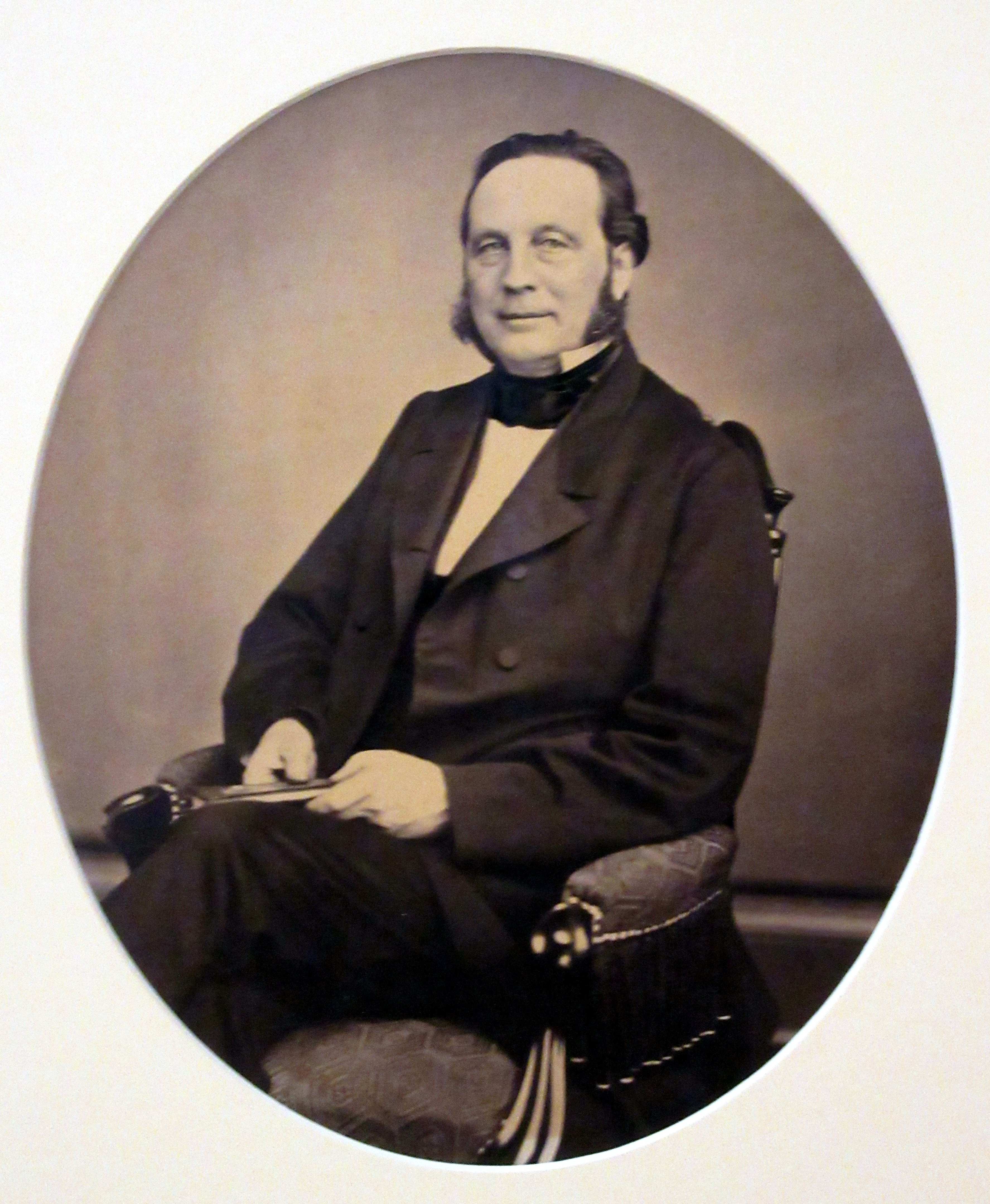 unbekannter Fotograf: Porträt Charles Petit, Albumin um 1870, Behnhaus Lübeck